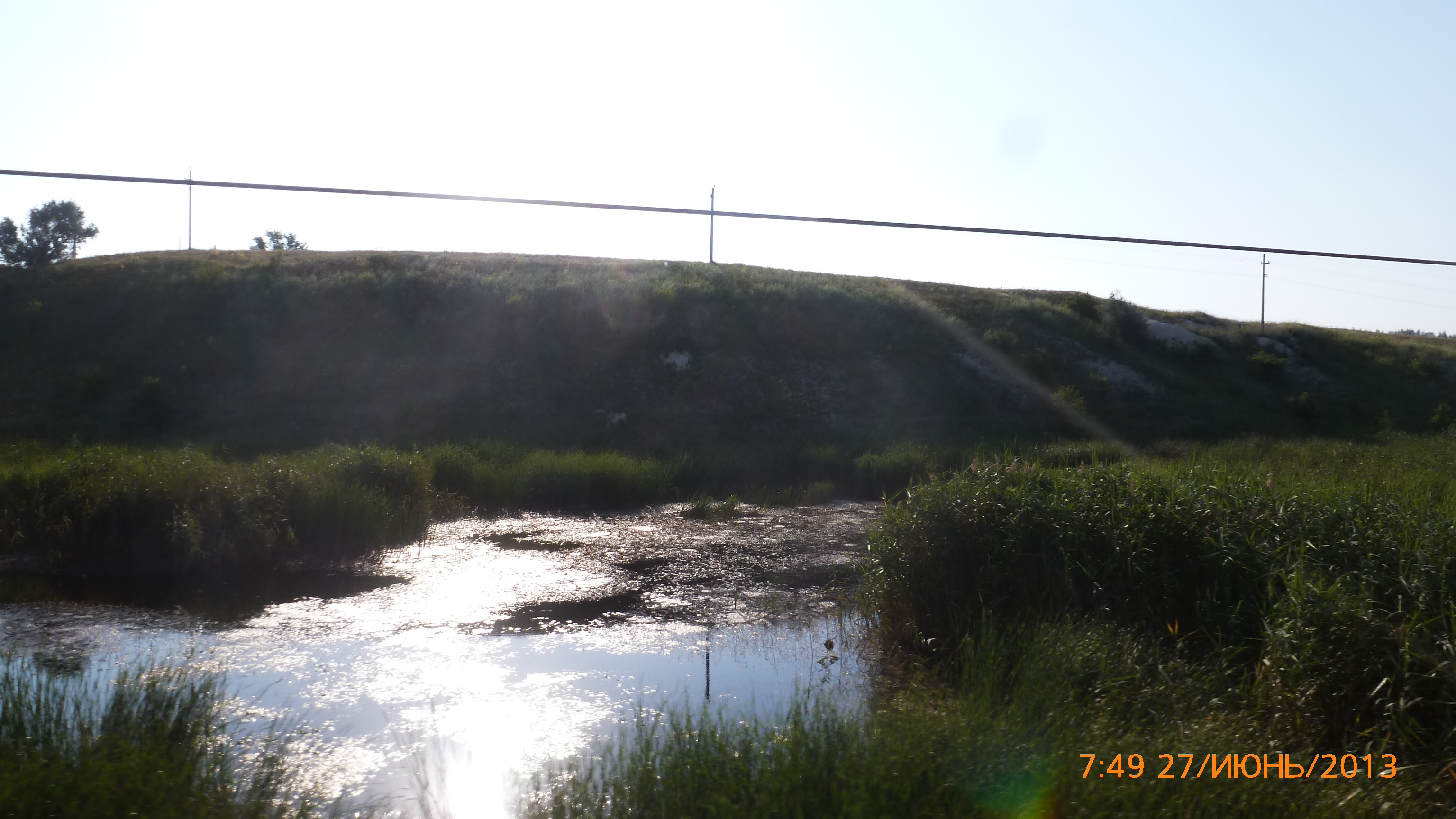 Tikhoretsky District, Krasnodar Krai, Russia